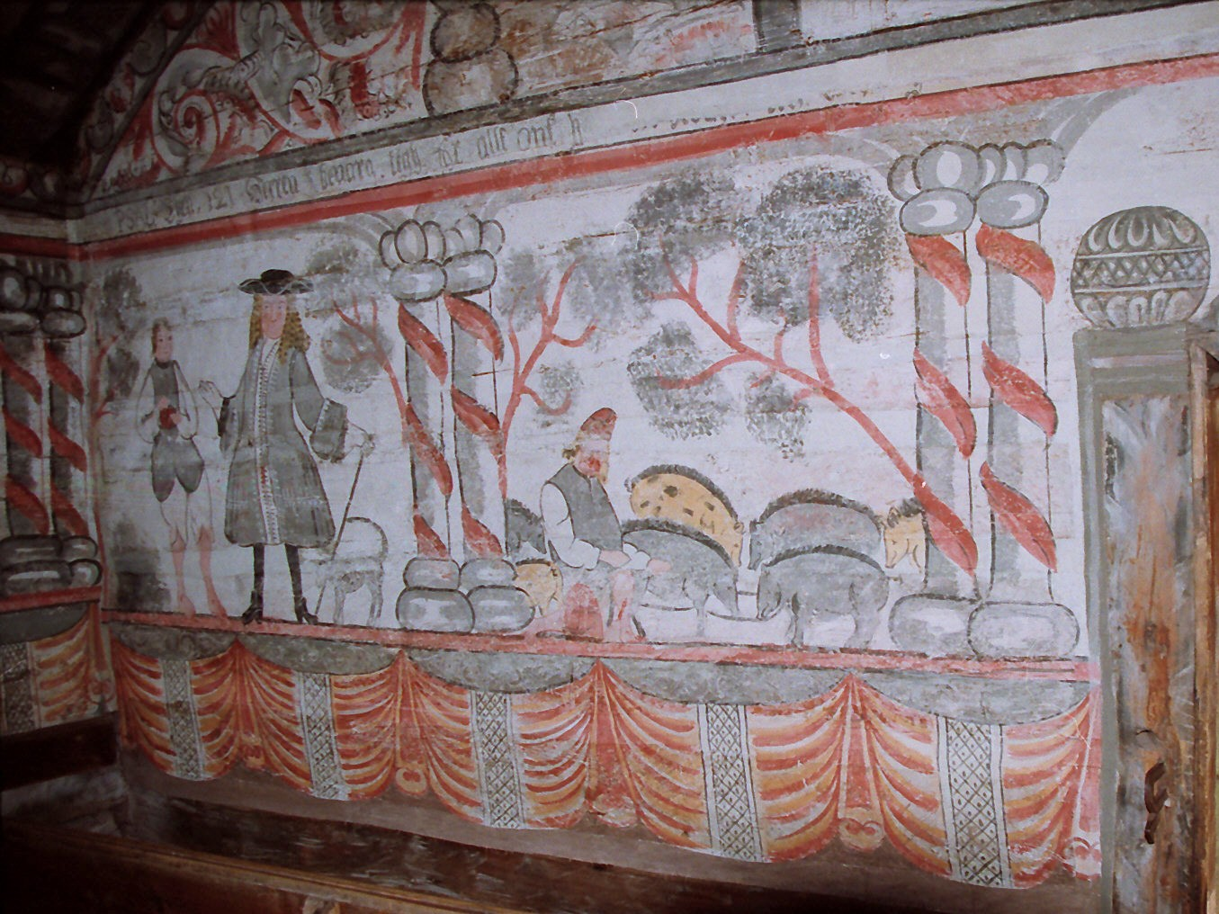 Ulvö kapell - väggmålning